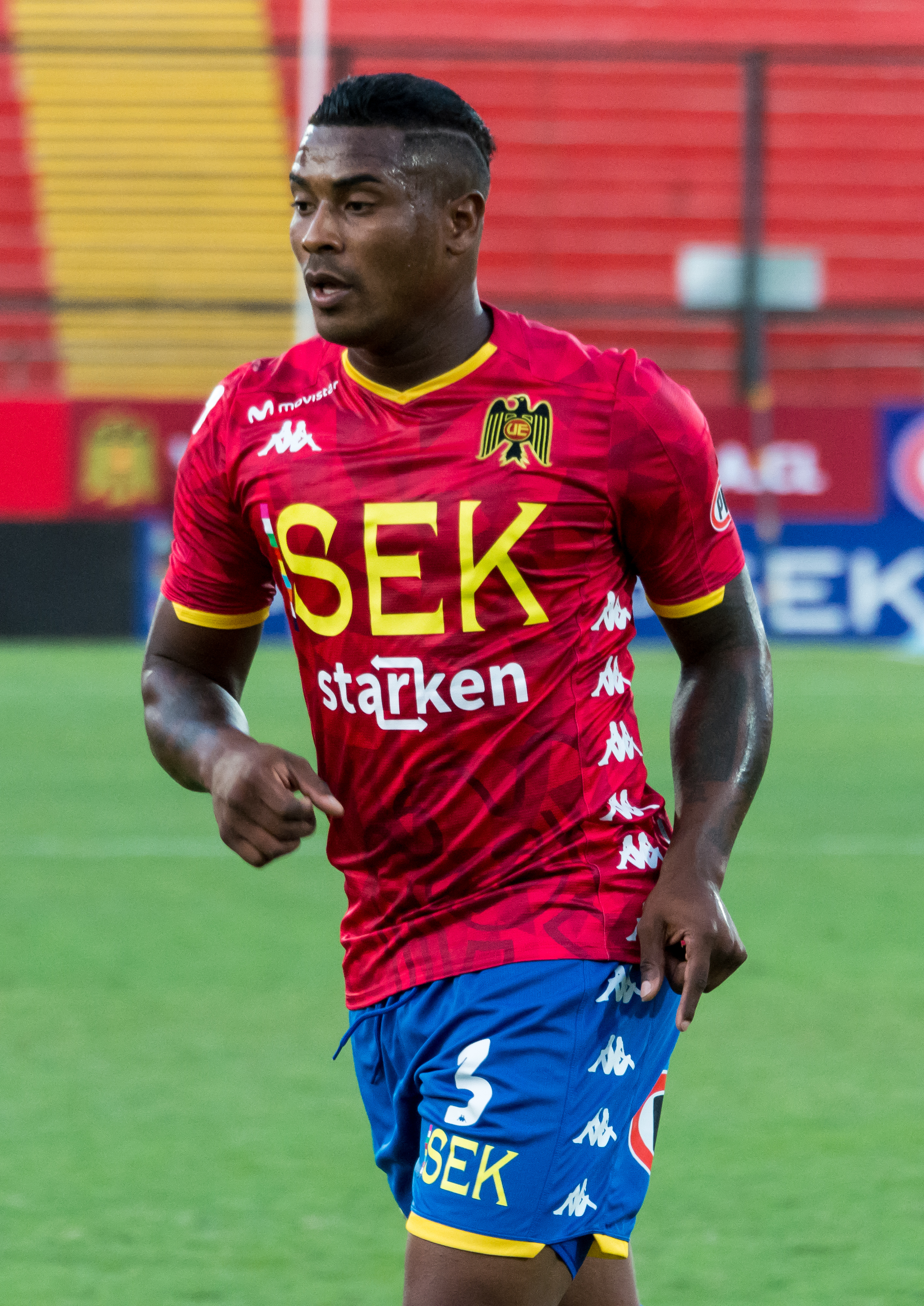 Unión Española v Deportes Iquique, Estadio Santa Laura, Independencia, Santiago, Región Metropolitana, Chile